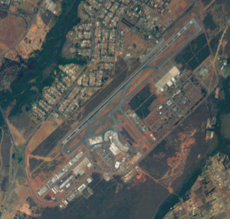 Imagem de satélite do aeroporto internacional de Brasília